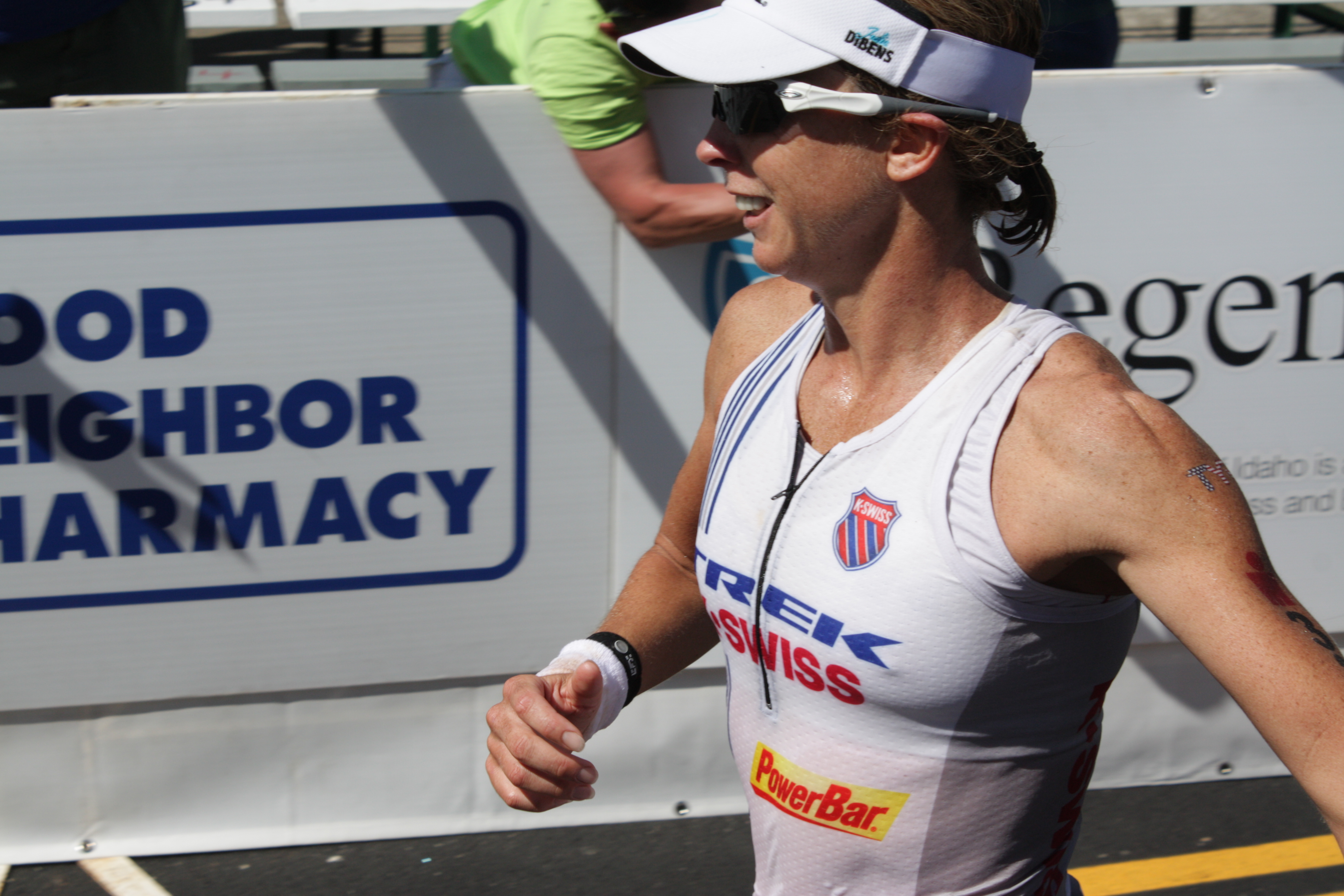 Women's Winner 2011 Ironman Coeur d'Alene